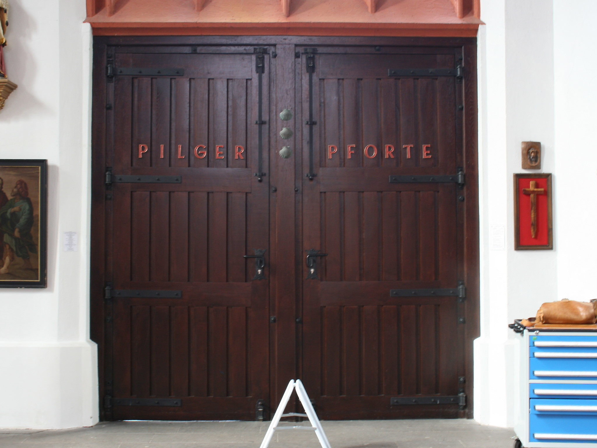 Sankt Peter und Paul in Kranenburg